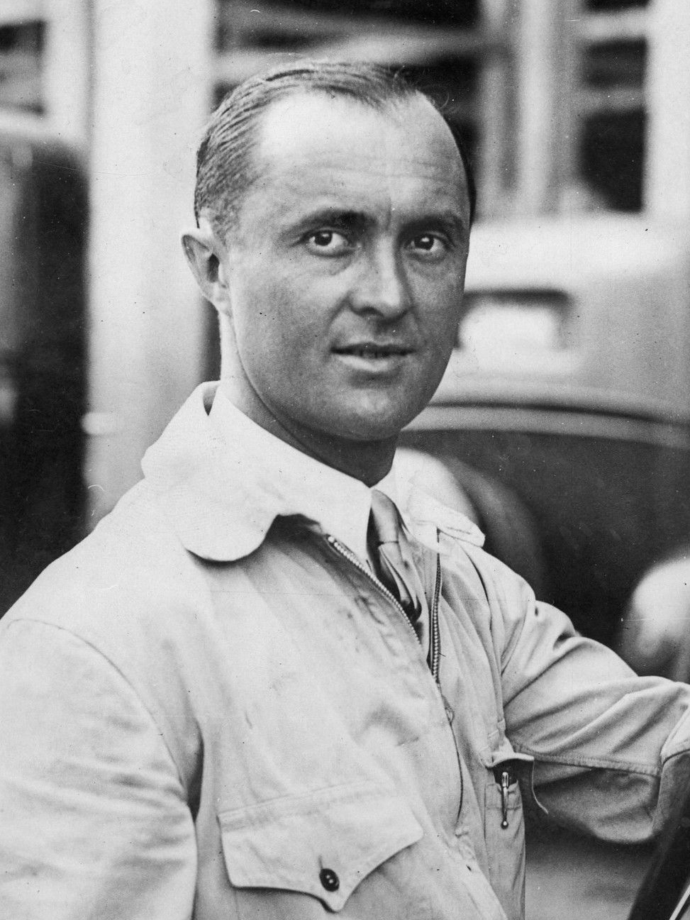 "CHIRON vainqueur s/BUGATTI (A.C.F. 1931)" Photo originale G. DEVRED (Agce ROL)